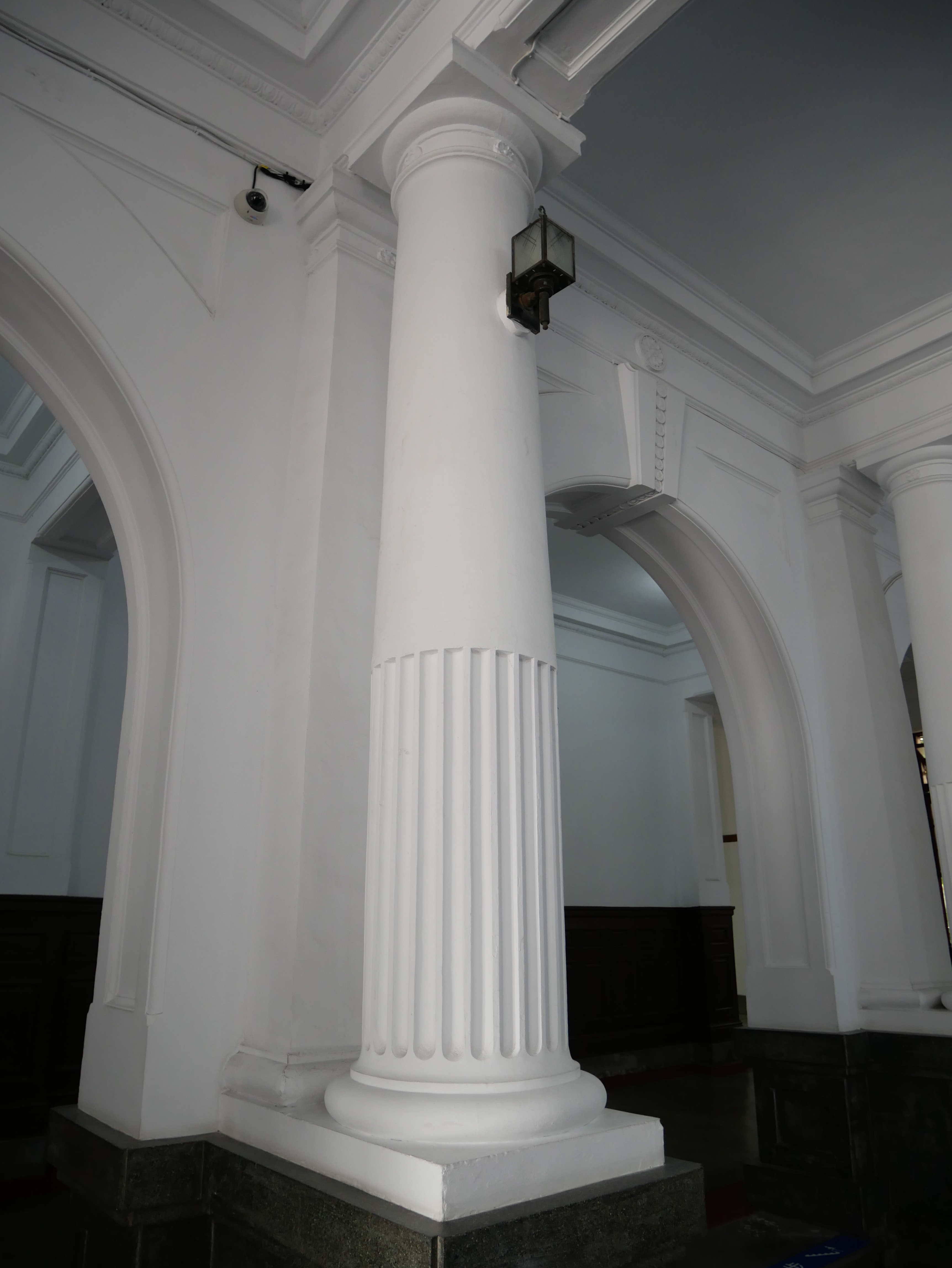 中文（台灣）: 新竹州廳內部多立克式柱，新竹市北區北門聯里大同里